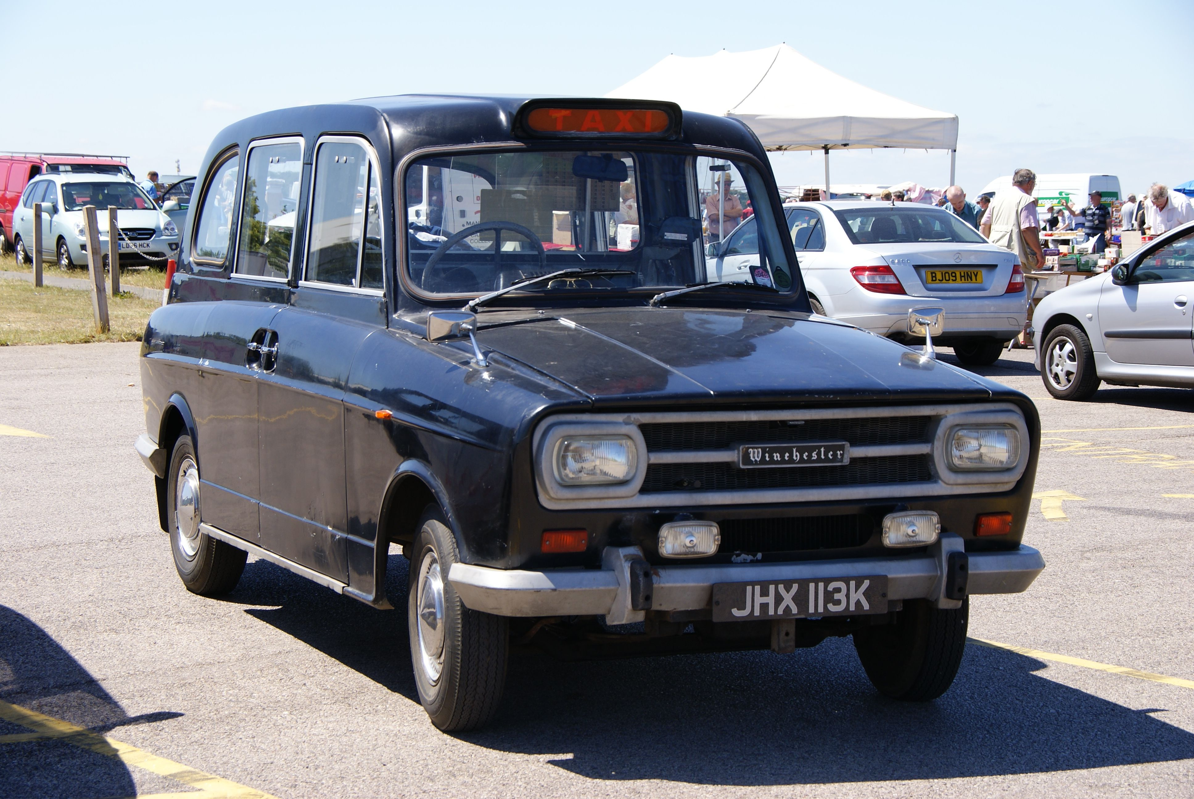 JHX113K-2 040710 CPS